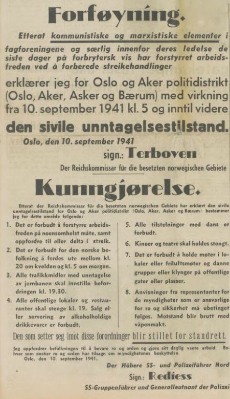 Erklæring om unntakstilstand i Oslo, Aker, Asker og Bærum i forbindelse med melkestreiken i 1941. Fra Nasjonal samlings hovedorgan Fritt Folk 10. september 1941.